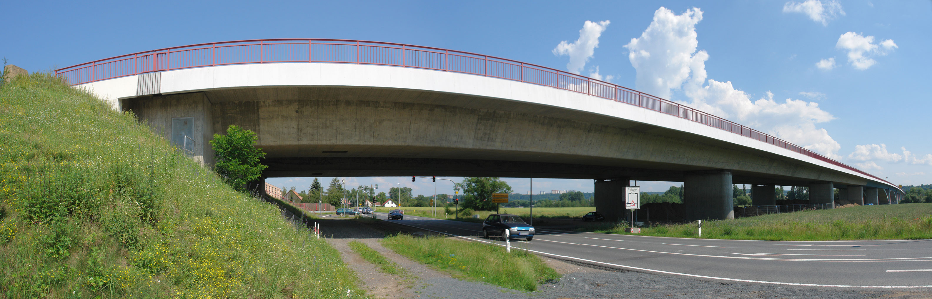 Sachsenbrücke (Pirna).